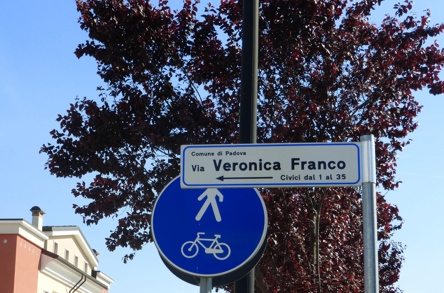 Veronica Franco Targa via